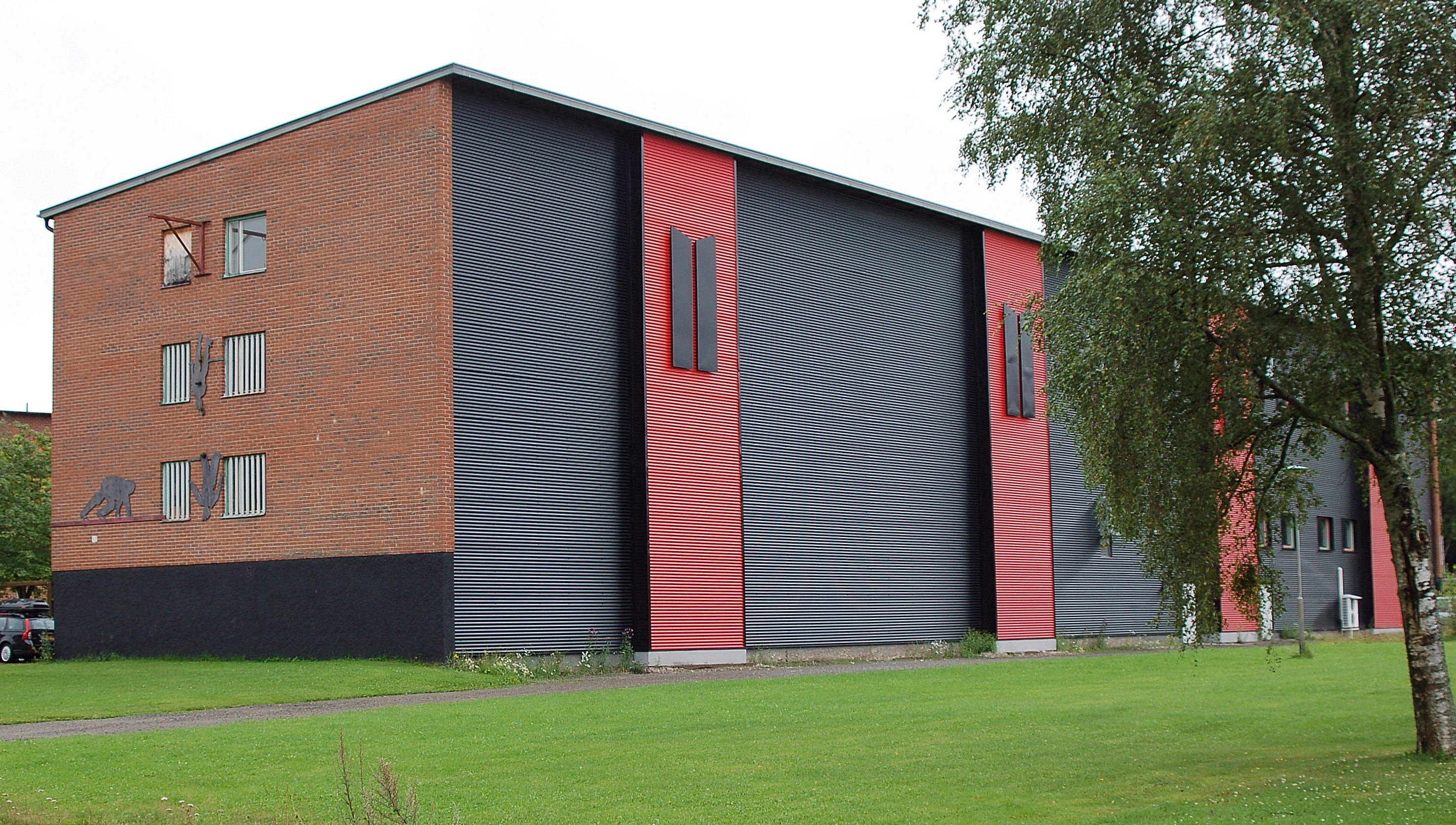 Äventyrsanläggningen Boda Borg, Karlskoga.